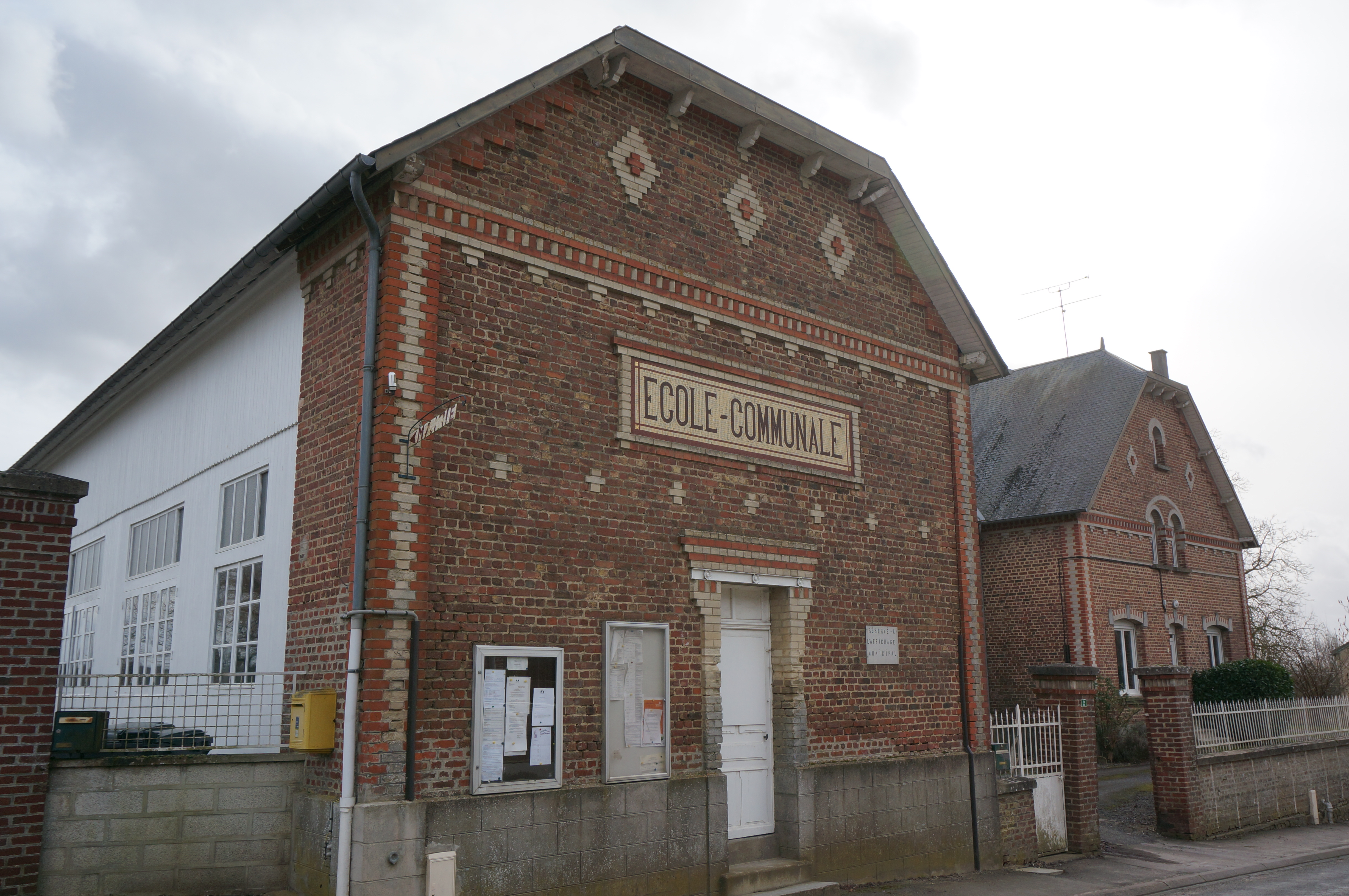 Prise de vue de Bois-lès-Pargny.